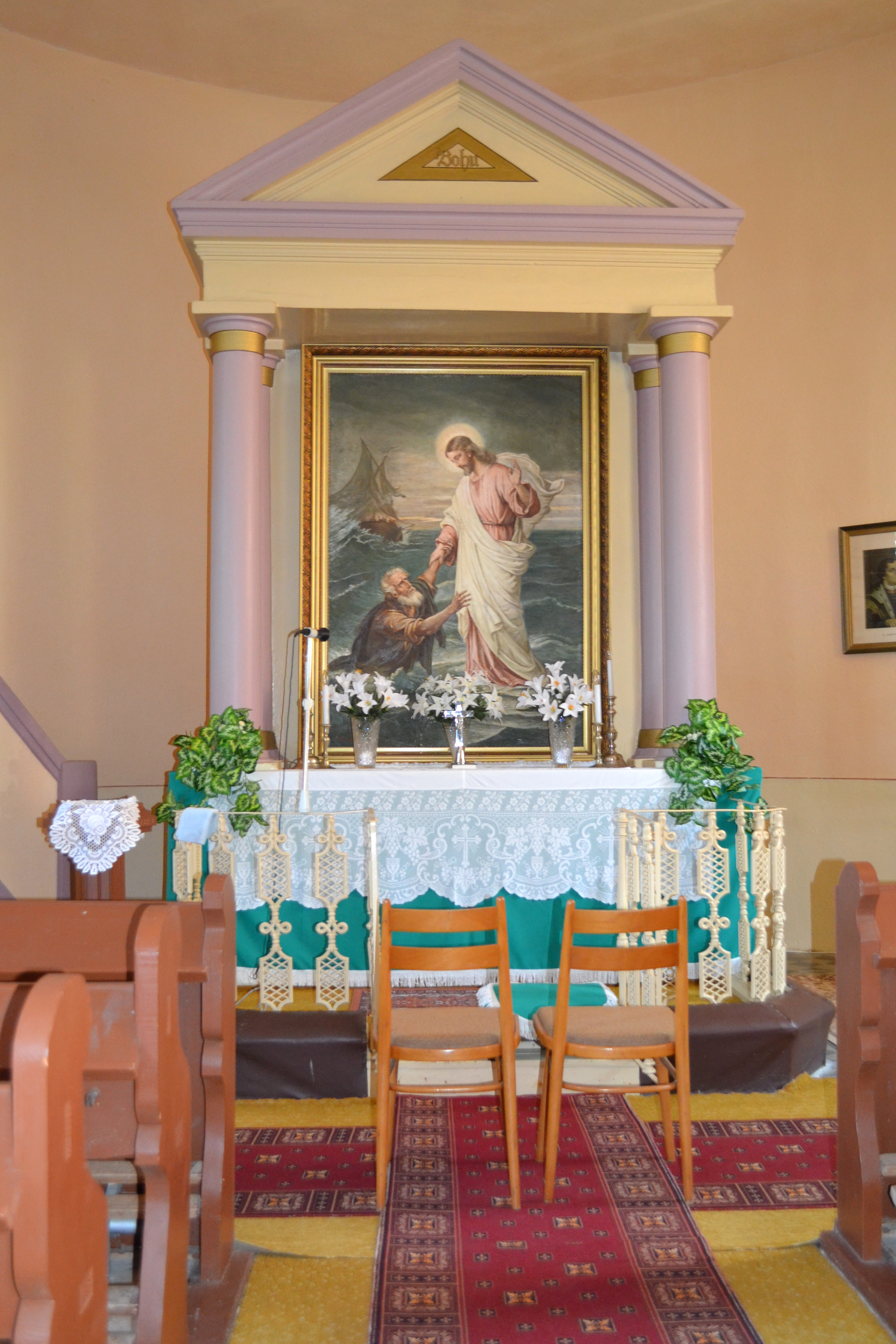 Interiér, neoklasicistický oltár s obrazom Krista na mori od lučeneckého maliara Františka Gyurkovitsa z roku 1949